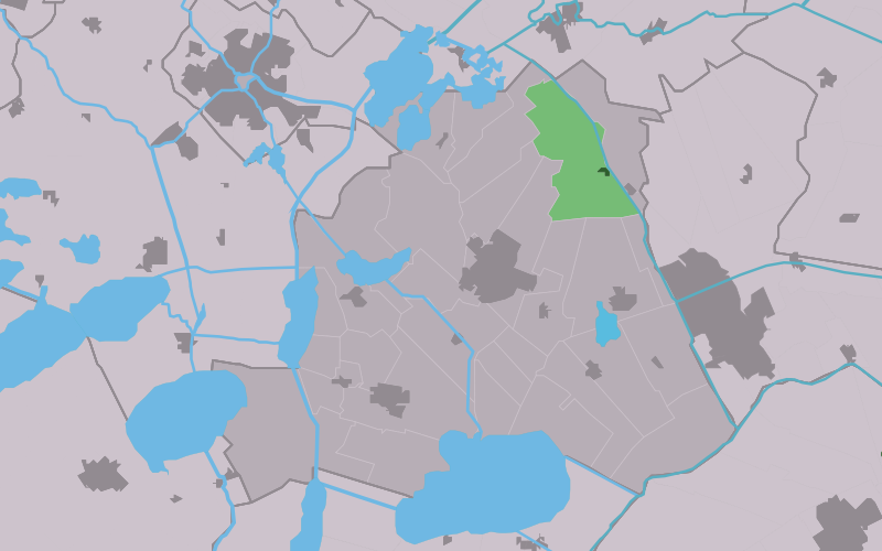 Kaartsje fan himrik fan Vegelinsoard